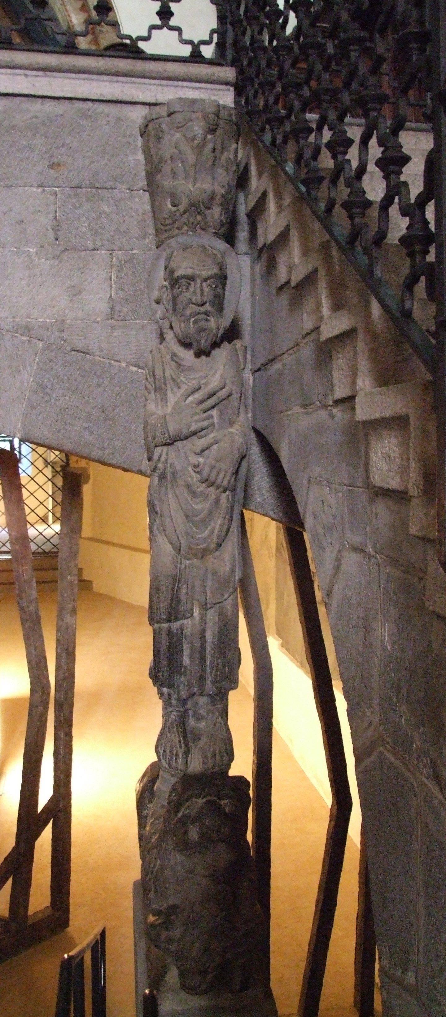 Schmucksäule in St. Maria Himmelfahrt (Chur) aus der Vorgängerkirche, Chur, Graubünden, Schweiz